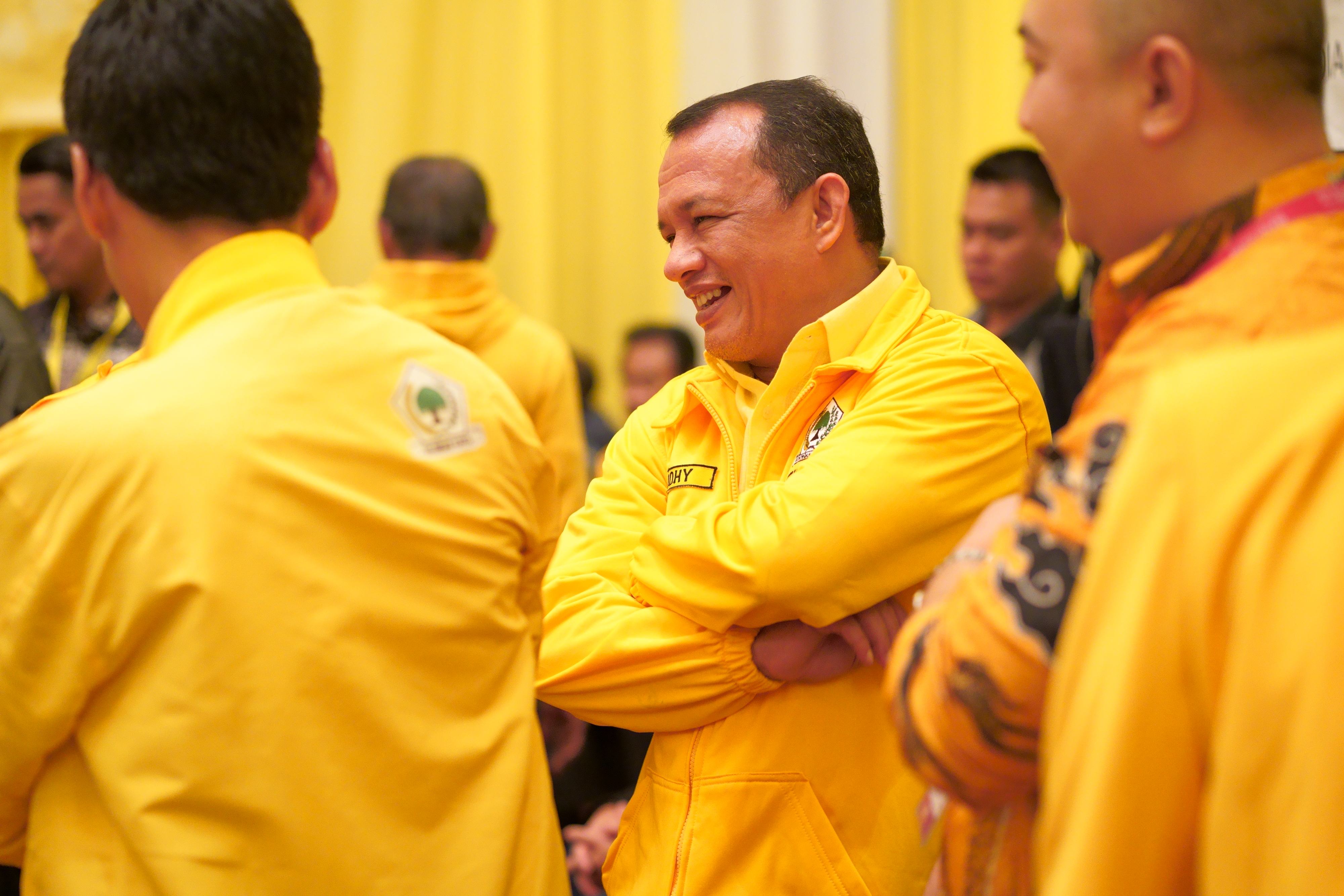 Munas X Partai Golongan Karya 2019